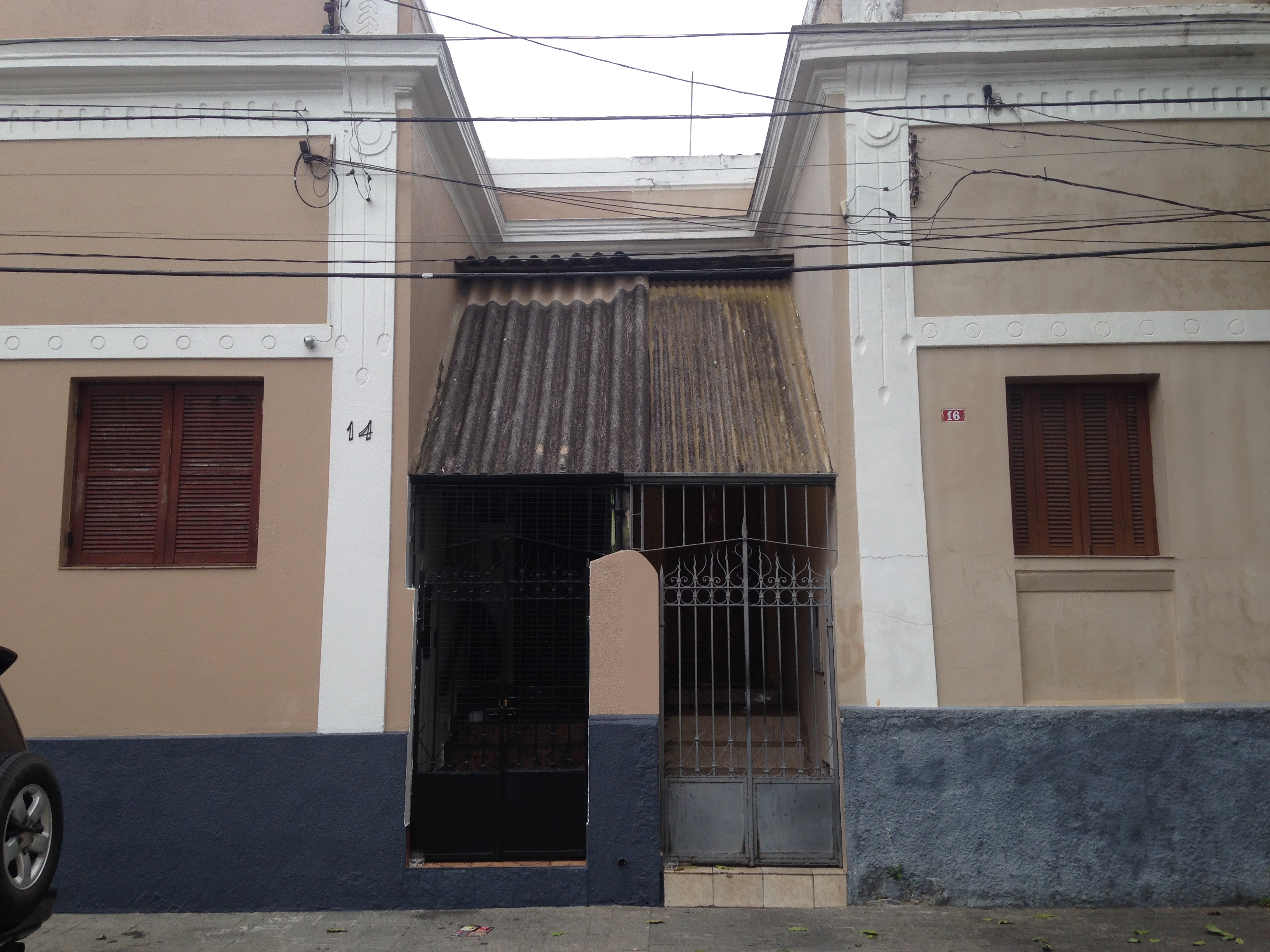 Portões de duas residências na Vila Economizadora, em São Paulo (SP)